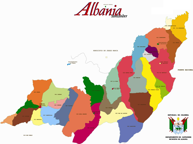 Mapa Albania